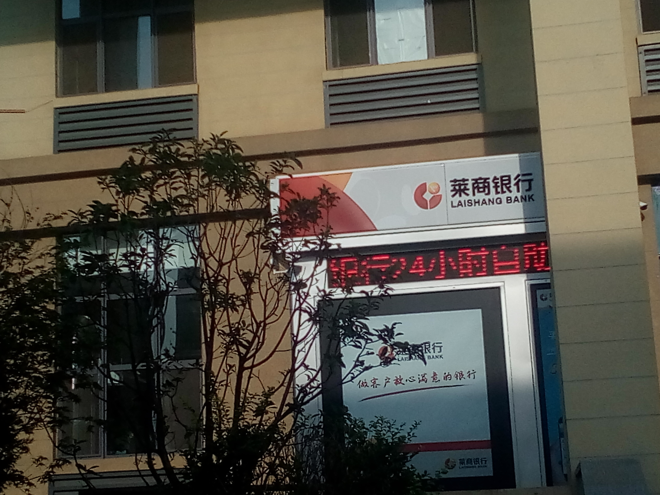 位于山东财经大学莱芜校区的莱商银行自动柜员机